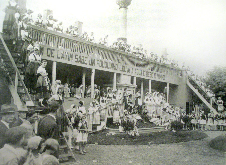 Pavilhões de exposição da Festa da Uva de Caxias do Sul